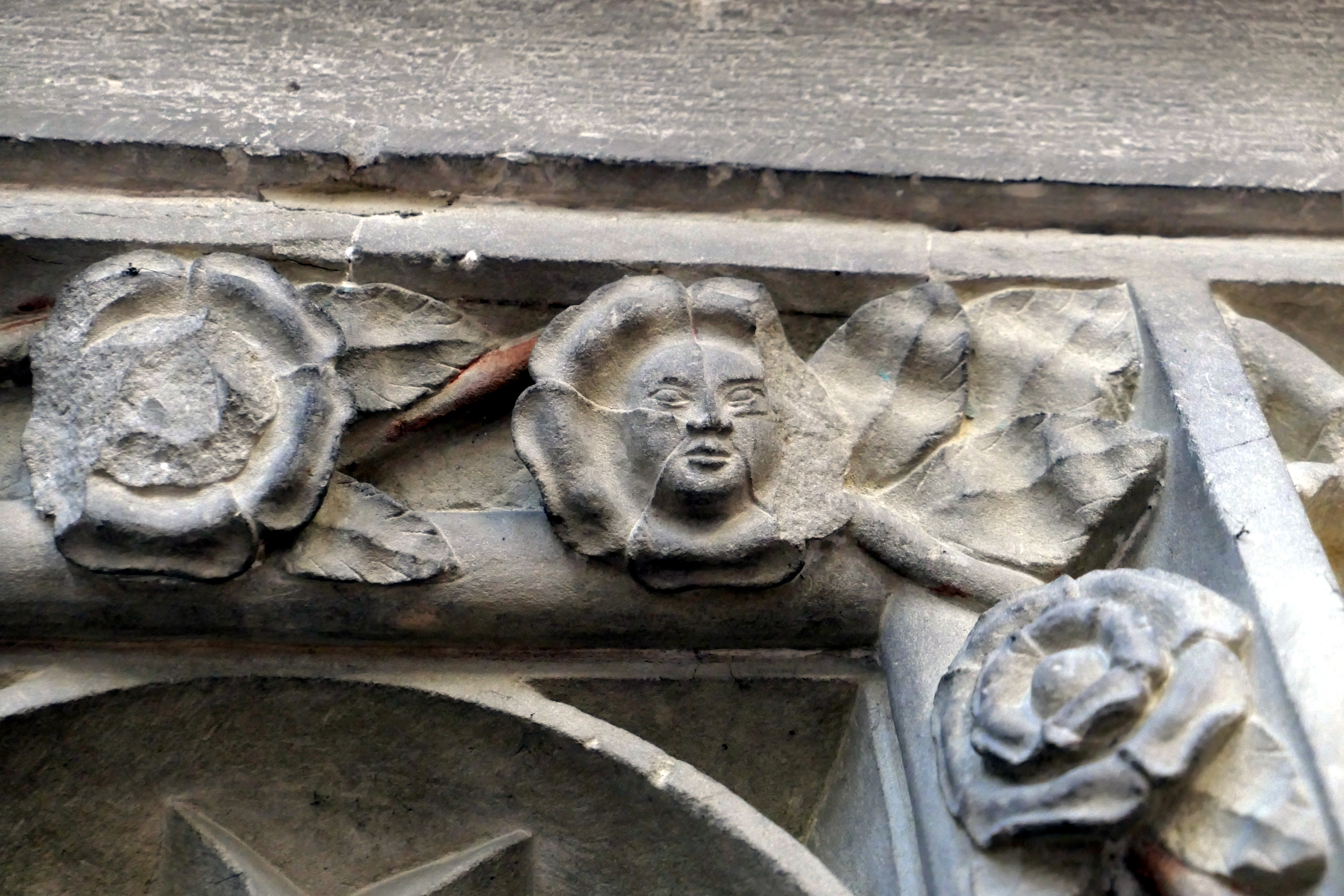 Blattmaske Markgröningen Spitalkirche Chor Sediliennische aus der ersten Bauphase um 1289